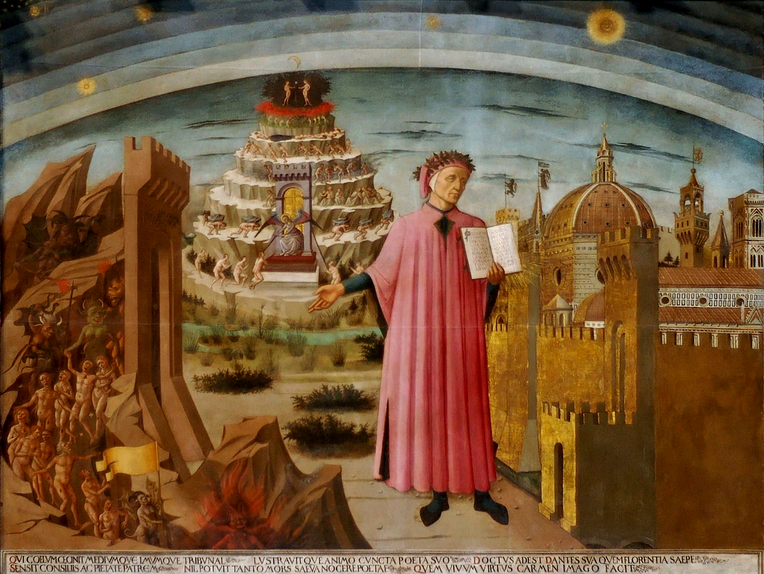 Dante Alighieri hält sein Epos die Göttliche Komödie vorzeigend in der linken Hand. Mit der rechten Hand weist er auf eine Prozession von Sündern zur Hölle, hinter ihm das Purgatorium und eine historische Ansicht der Stadt Florenz.